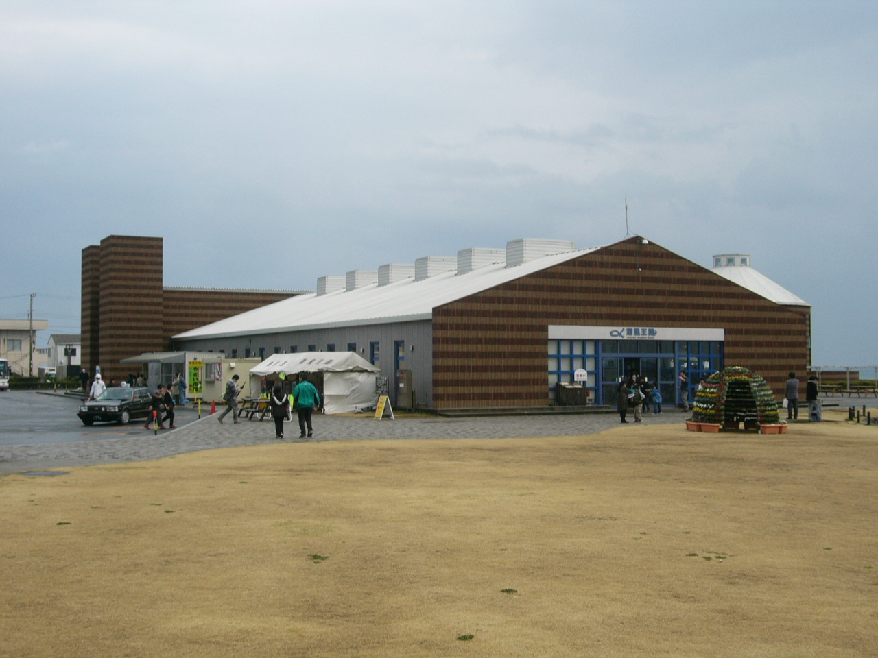 Michinoeki Chikura Shiokaze Okoku (道の駅ちくら・潮風王国 Chiba)